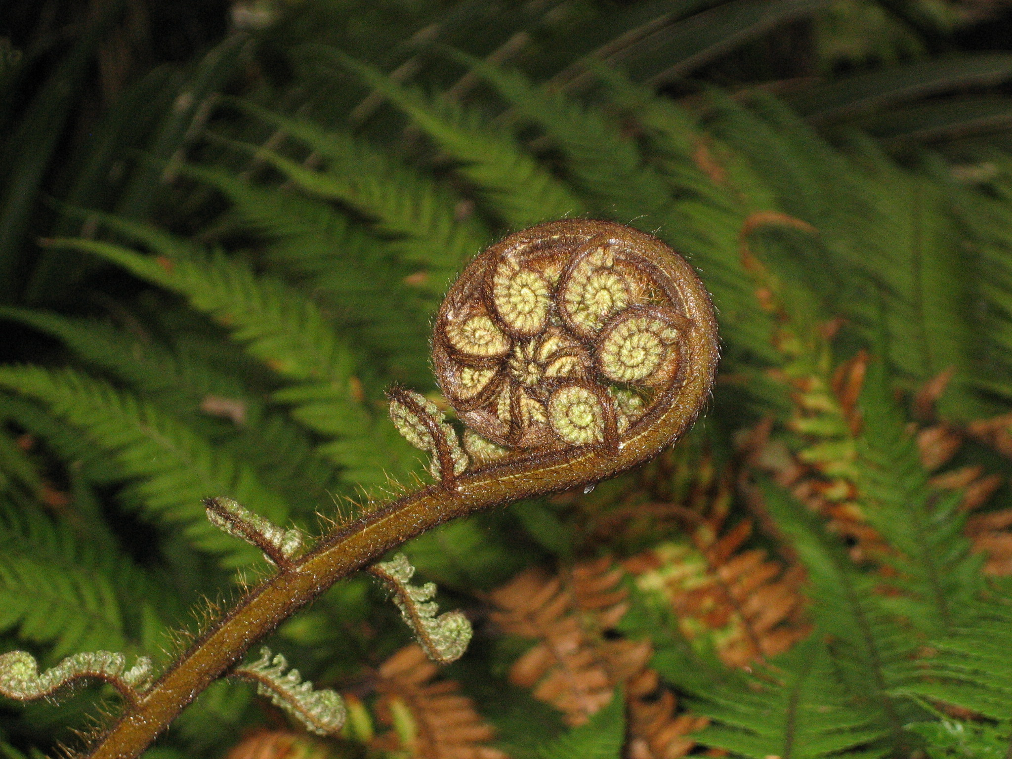 Fougère